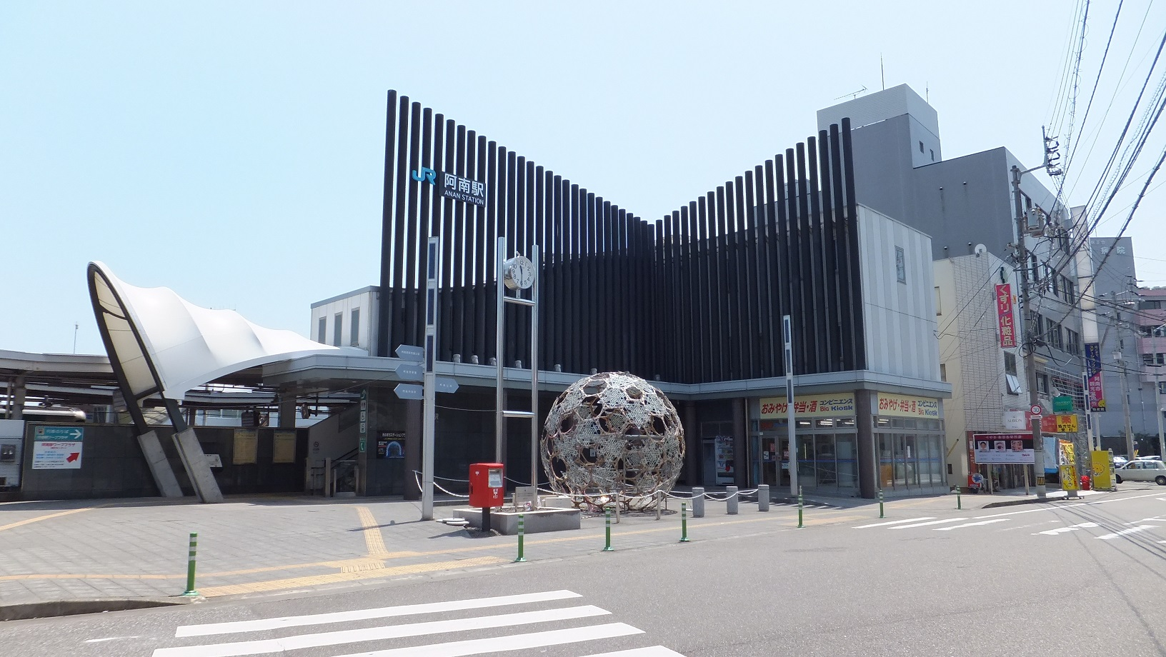 徳島県阿南市の阿南駅